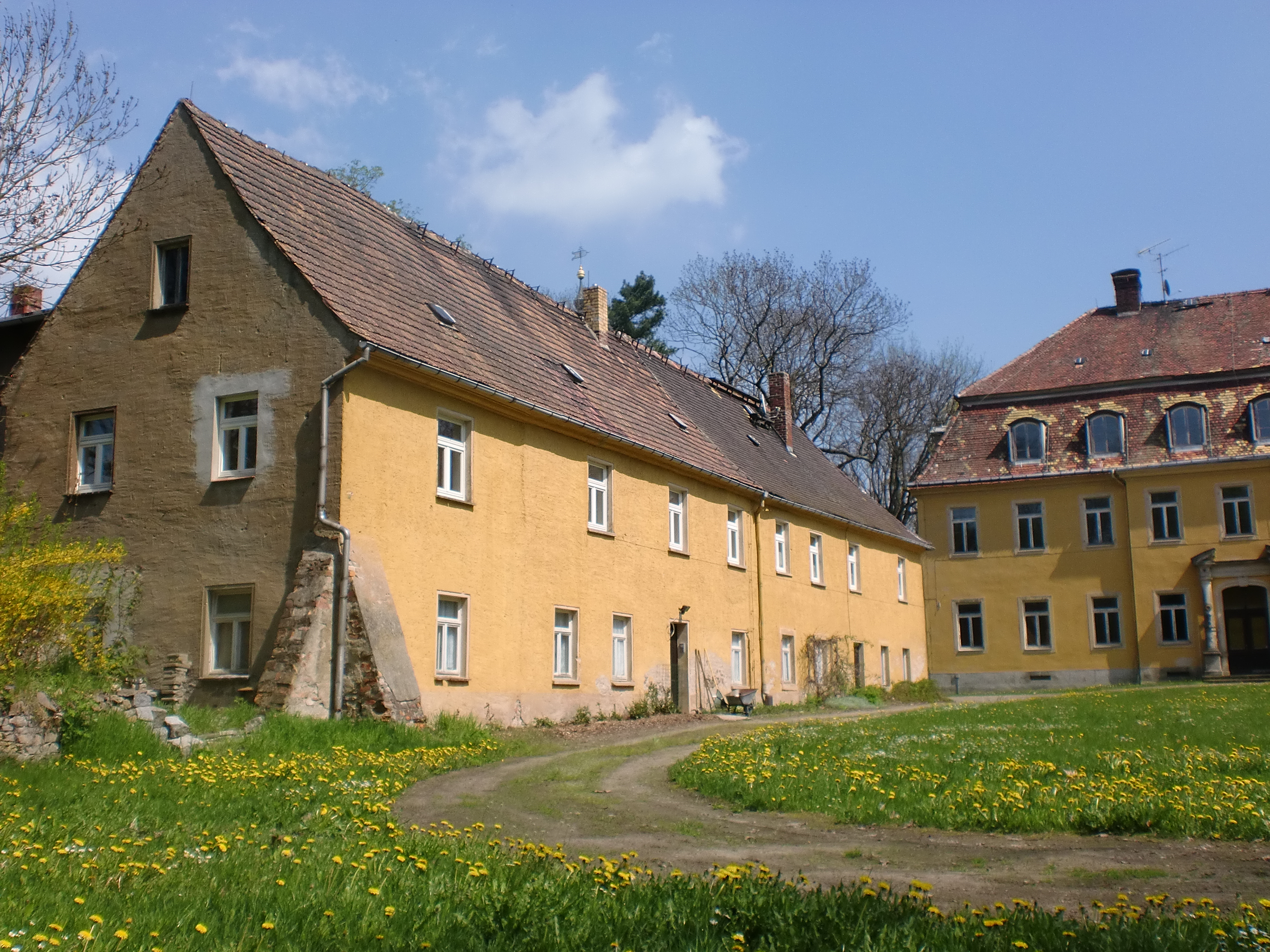 Das Kavaliershaus "Inspektorhaus" an der Nordseite des Ehrenshofes